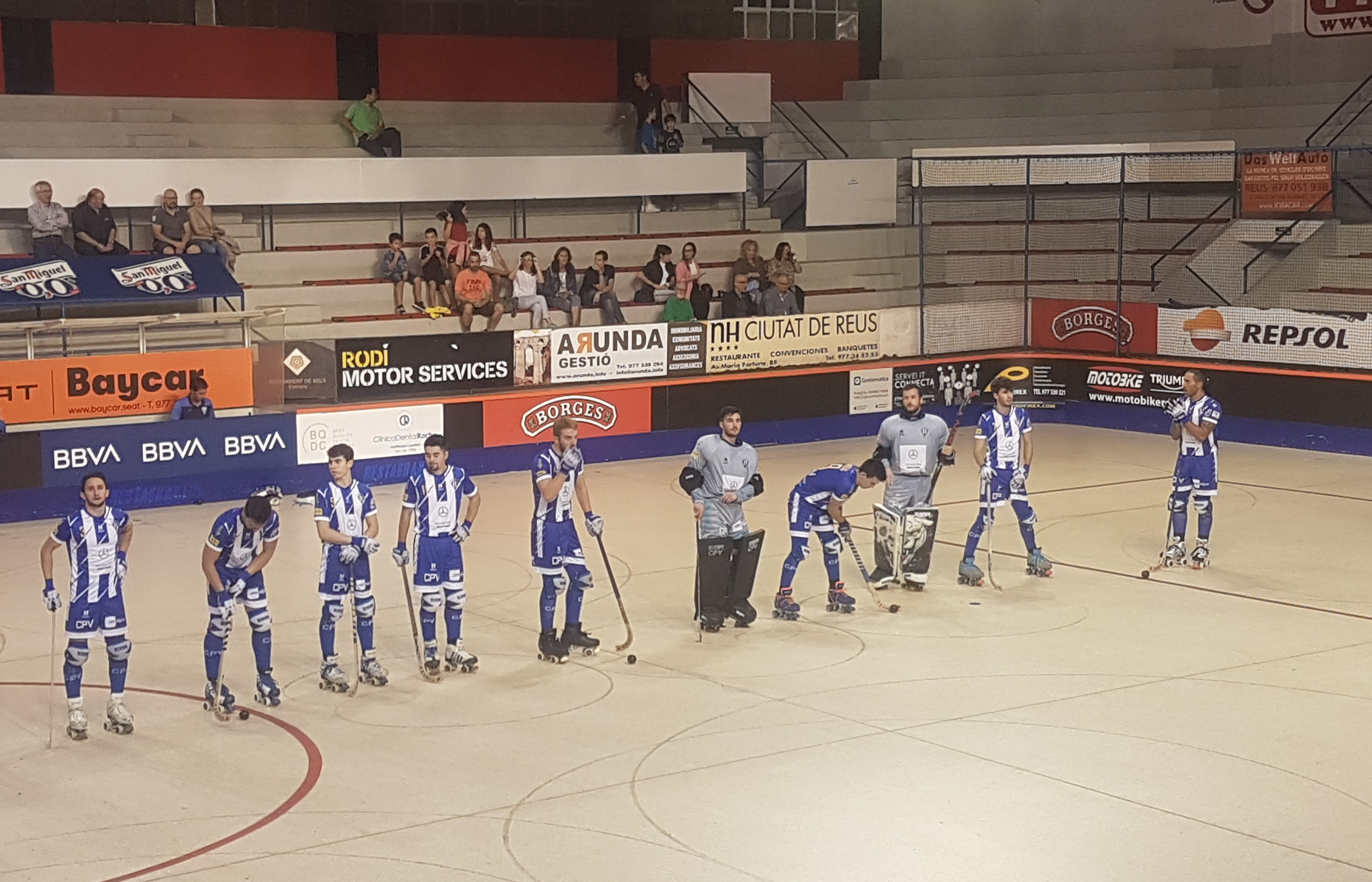 Plantilla Club Patí Voltregà